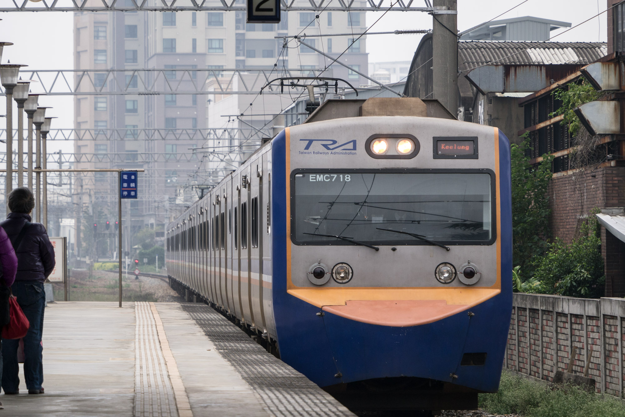 第1198車次區間車（EMU718）順行西部幹線北段 北新竹火車站 North Hsinchu Station